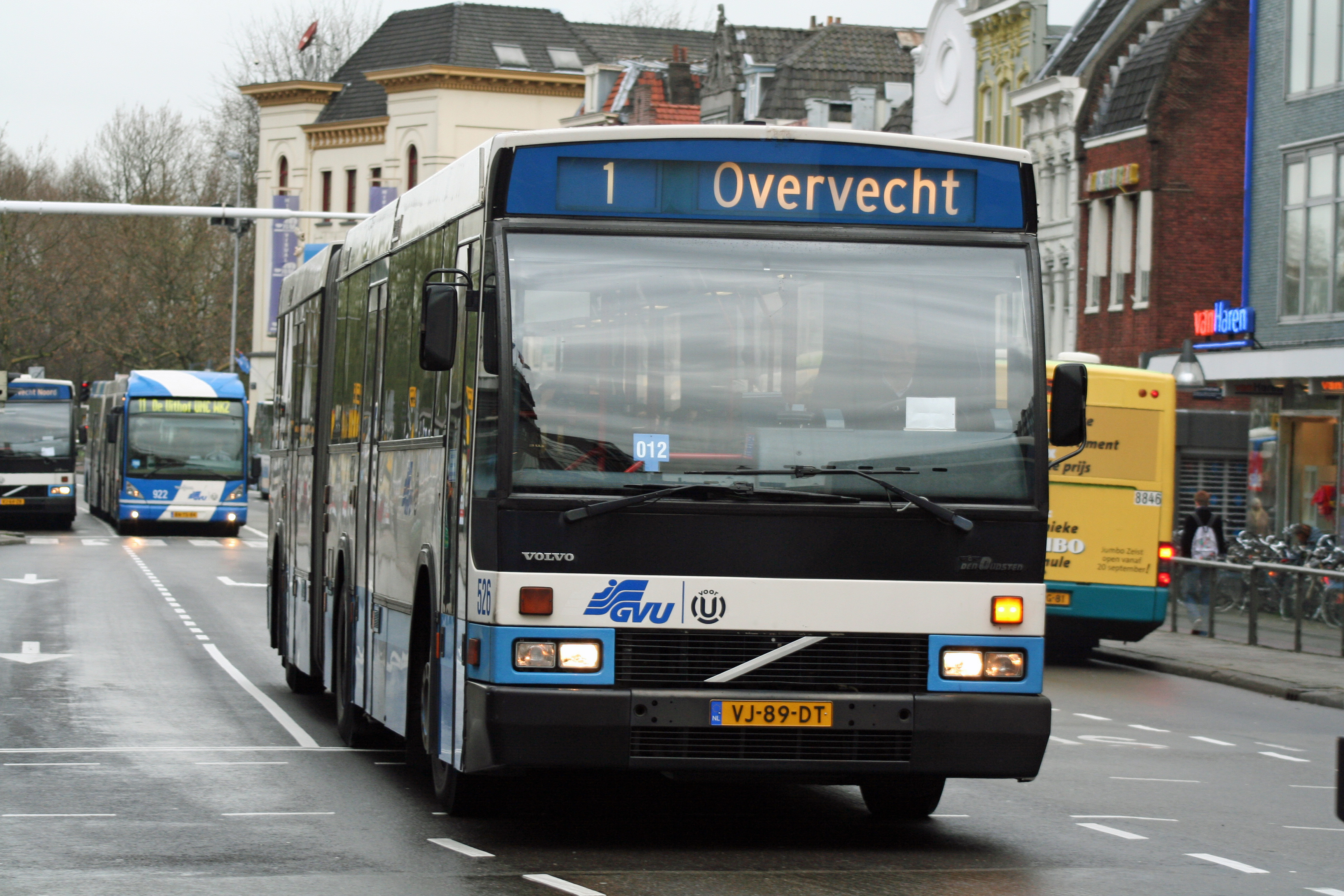 Een Den Oudsten B88 van GVU onderweg op het Vredenburg in het centrum van Utrecht.